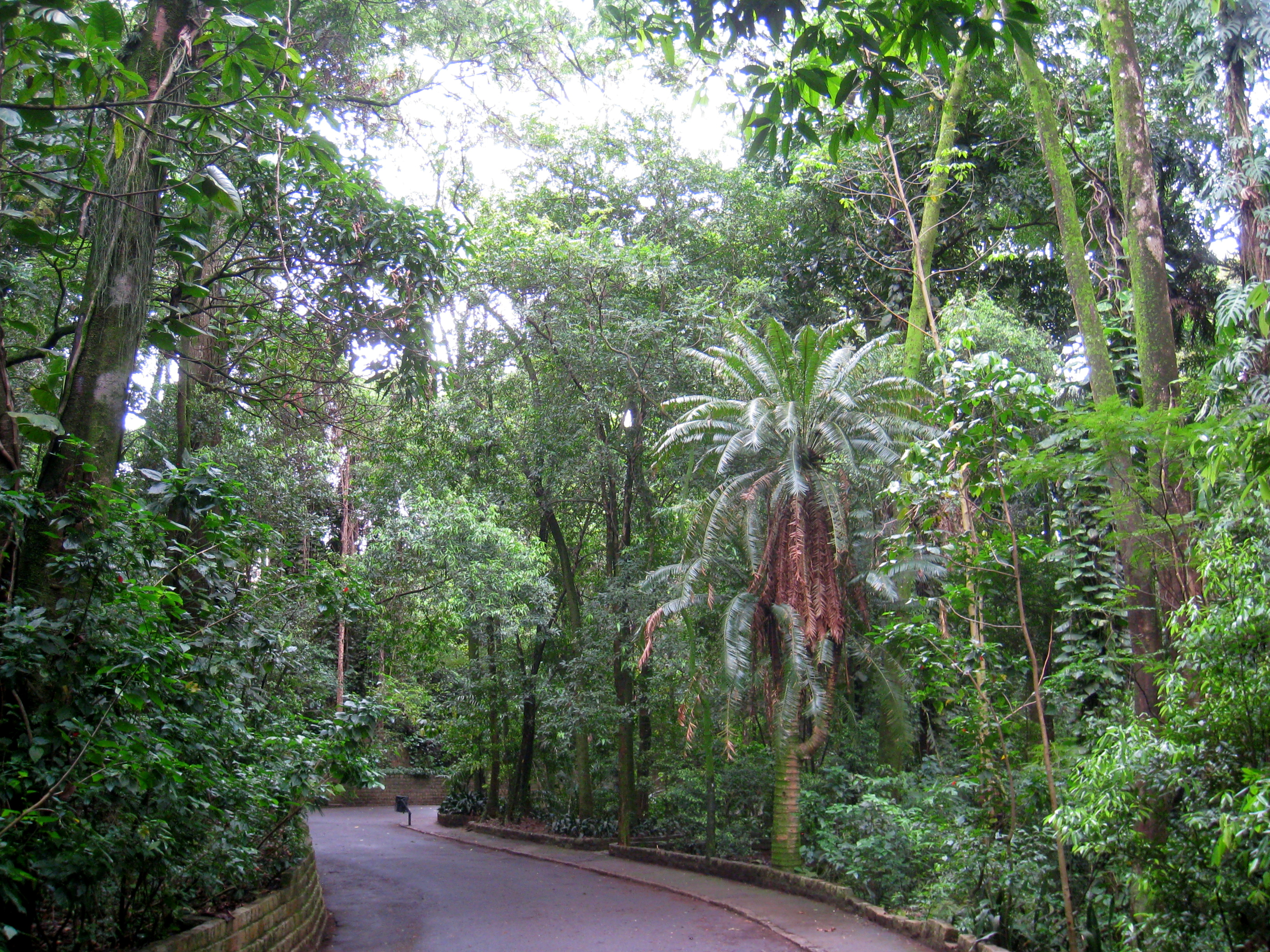 Bosque dos Jequitibás, Campinas, SP, Brazil.